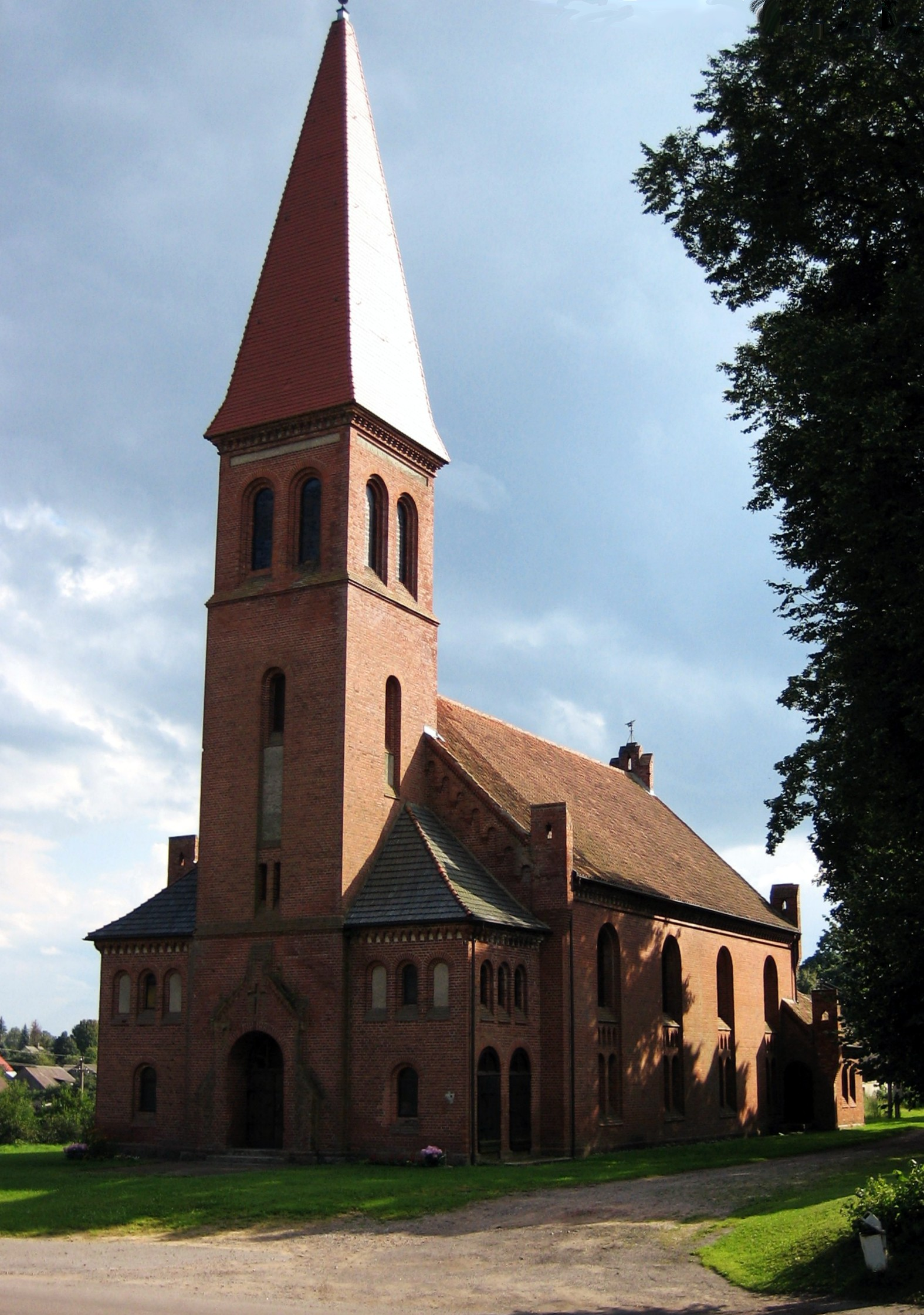 Vilkyškių evangelikų liuteronų bažnyčia